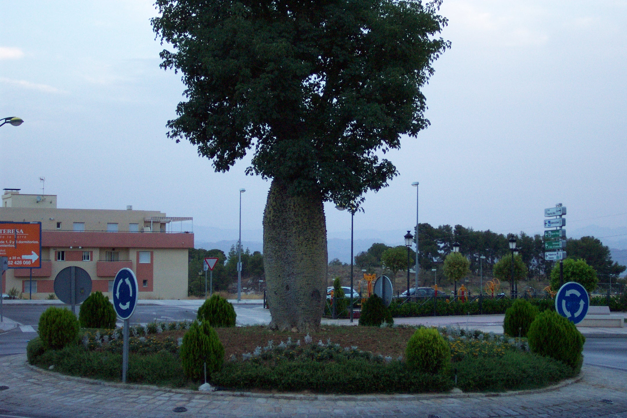 Alhaurín de la Torre, Spain.